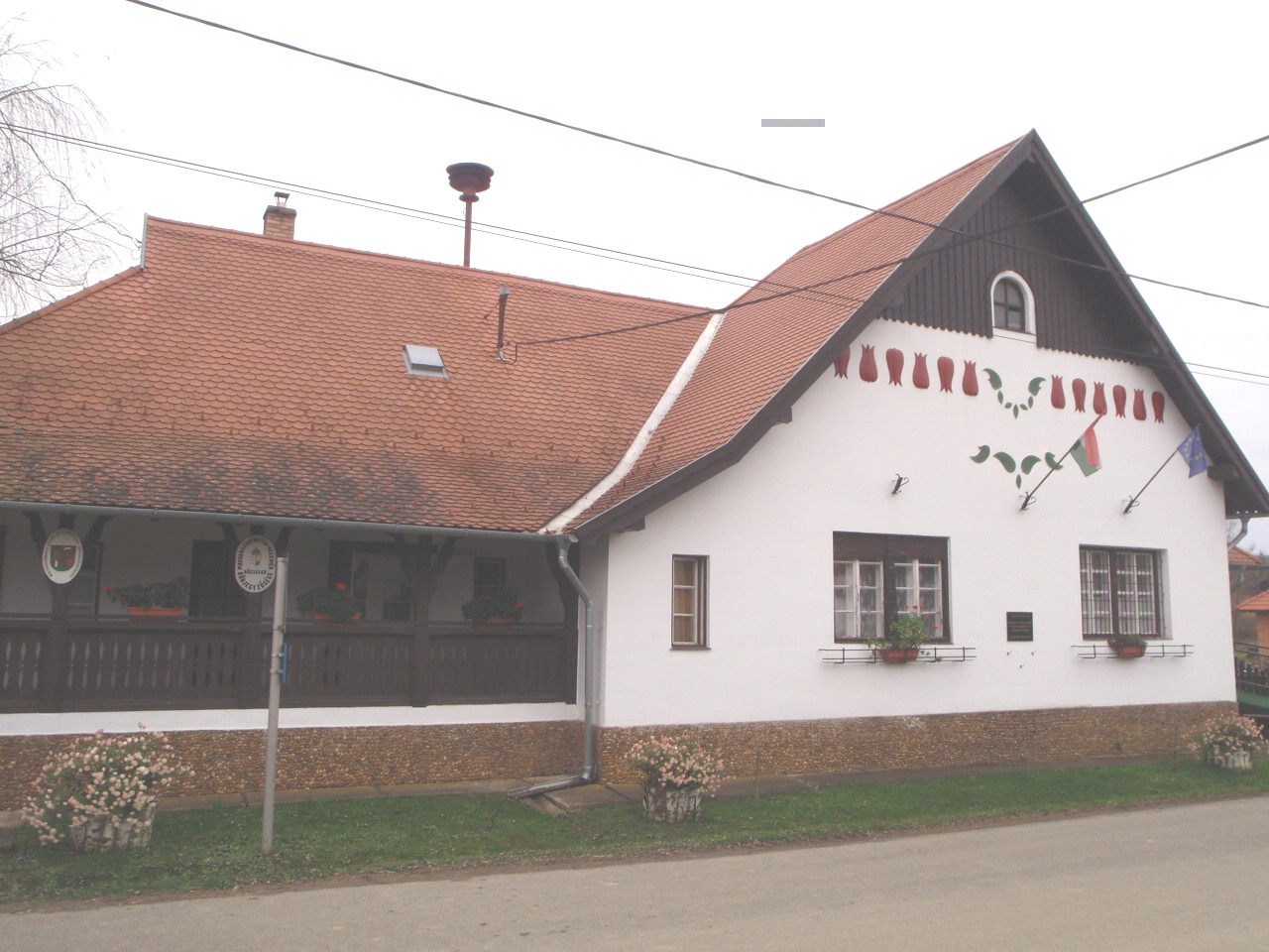 Magyarszombatfa Önkormányzata